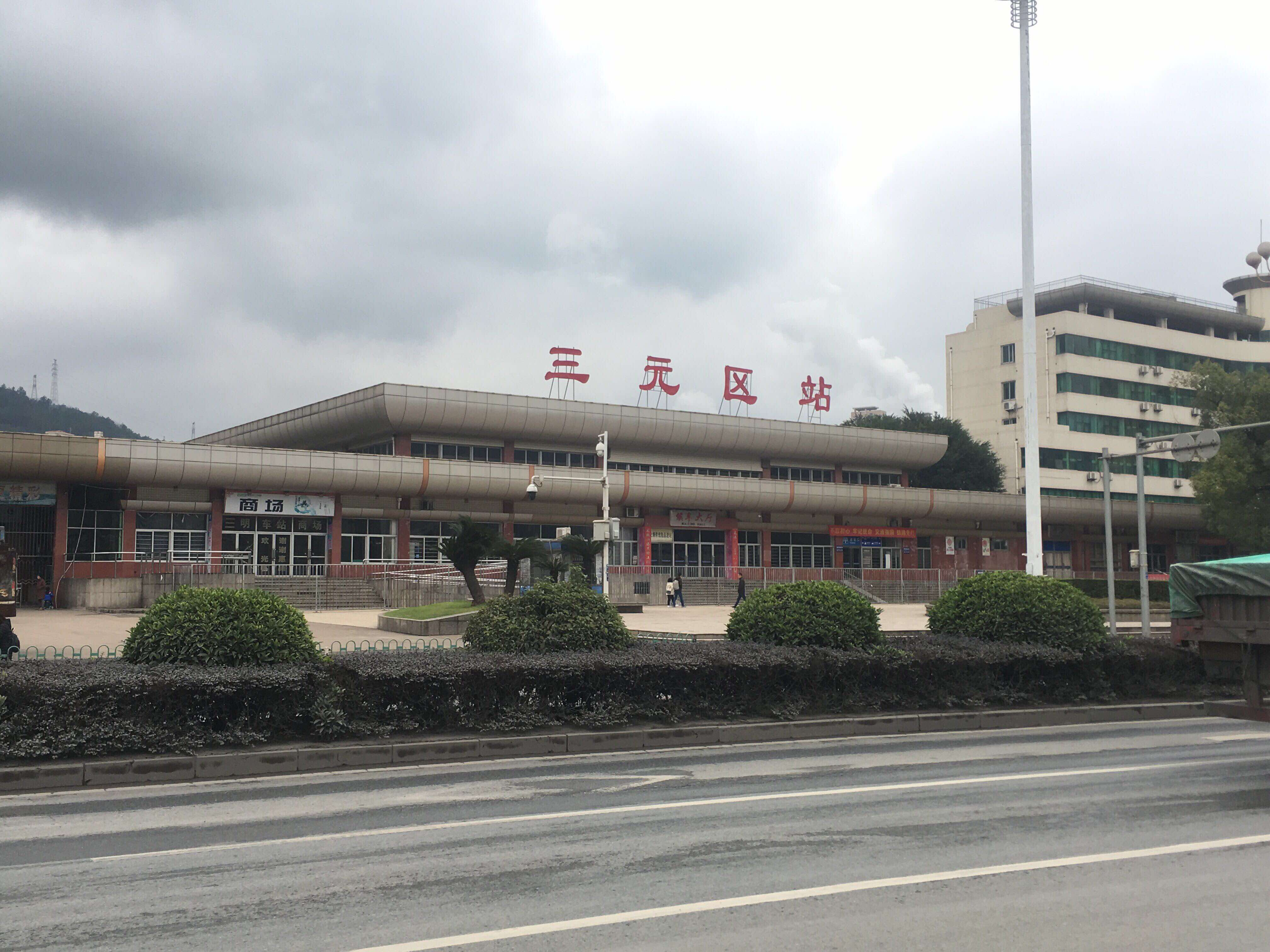 更名后的三元区站